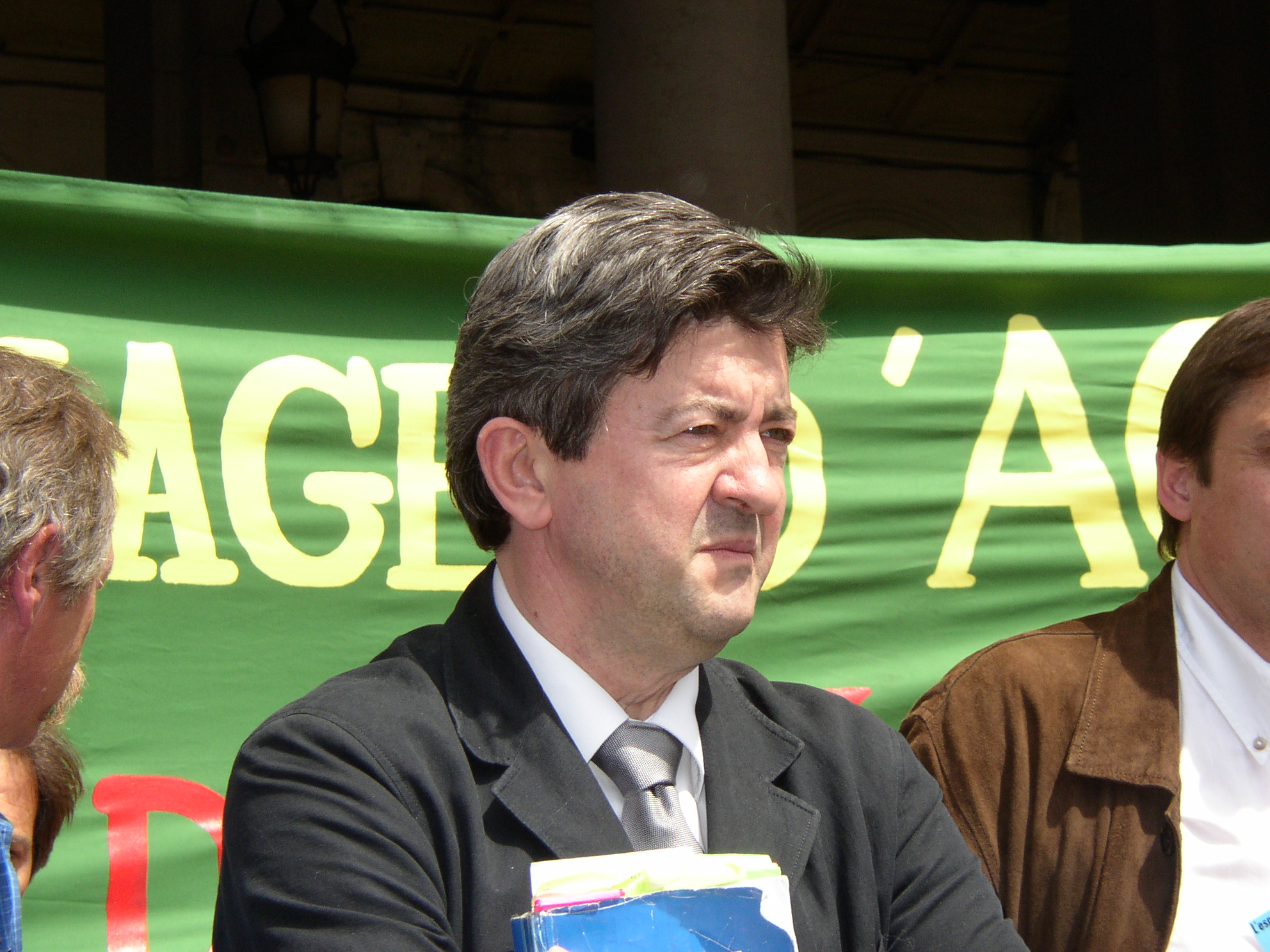 Jean-Luc Mélenchon, à la gare Saint-Lazare, Paris, France